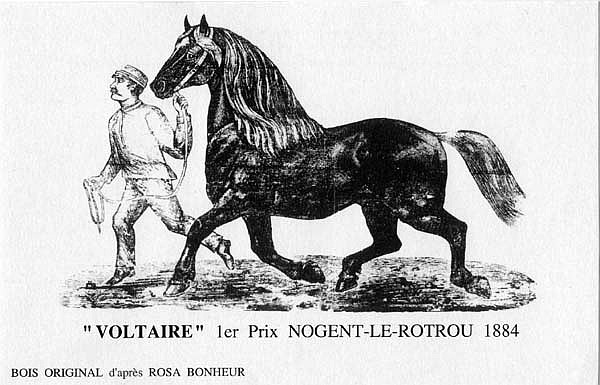 Voltaire, percheron noir vainqueur d'un concours de chevaux de trait à Nogent-le-Rotrou en 1884